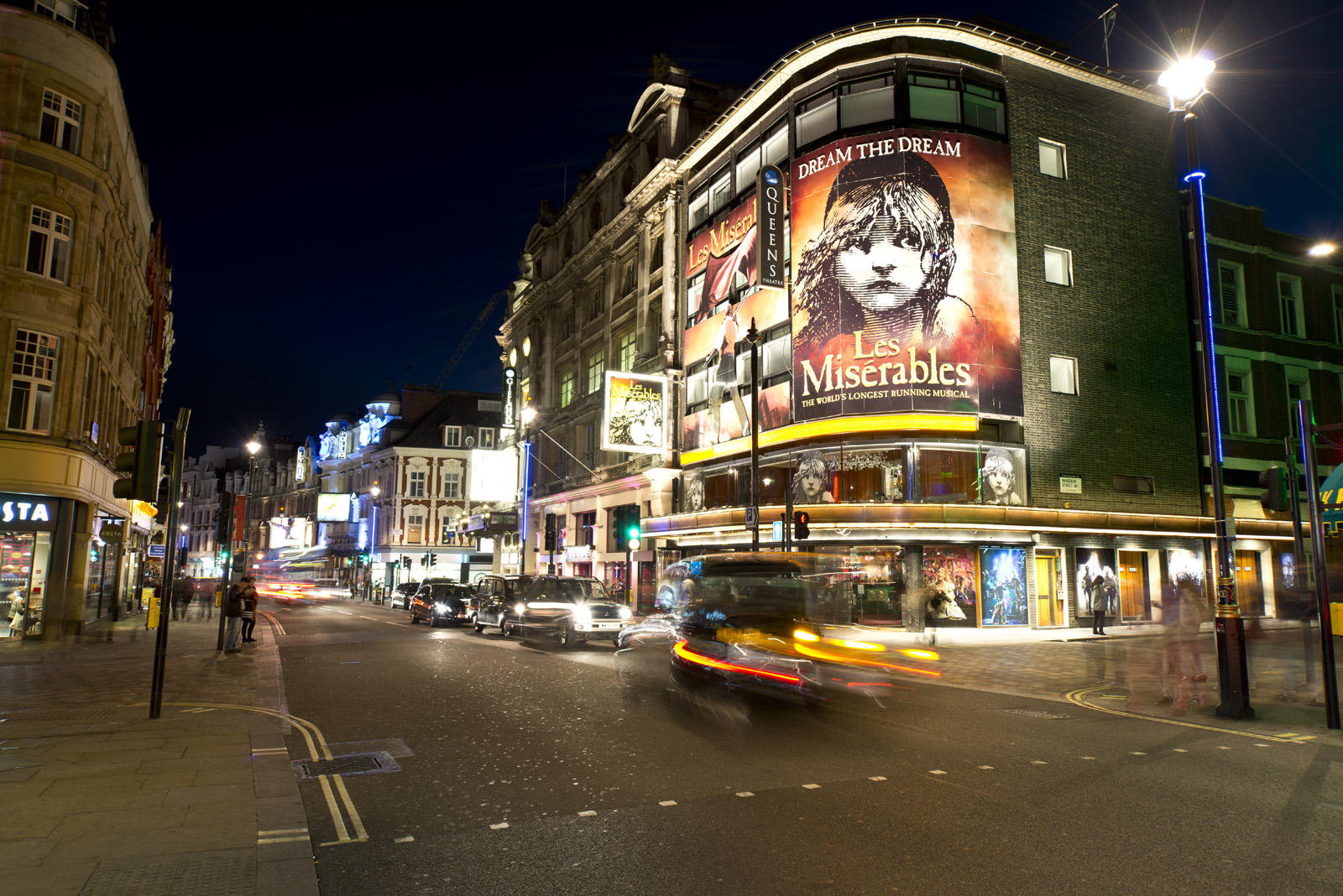 West End